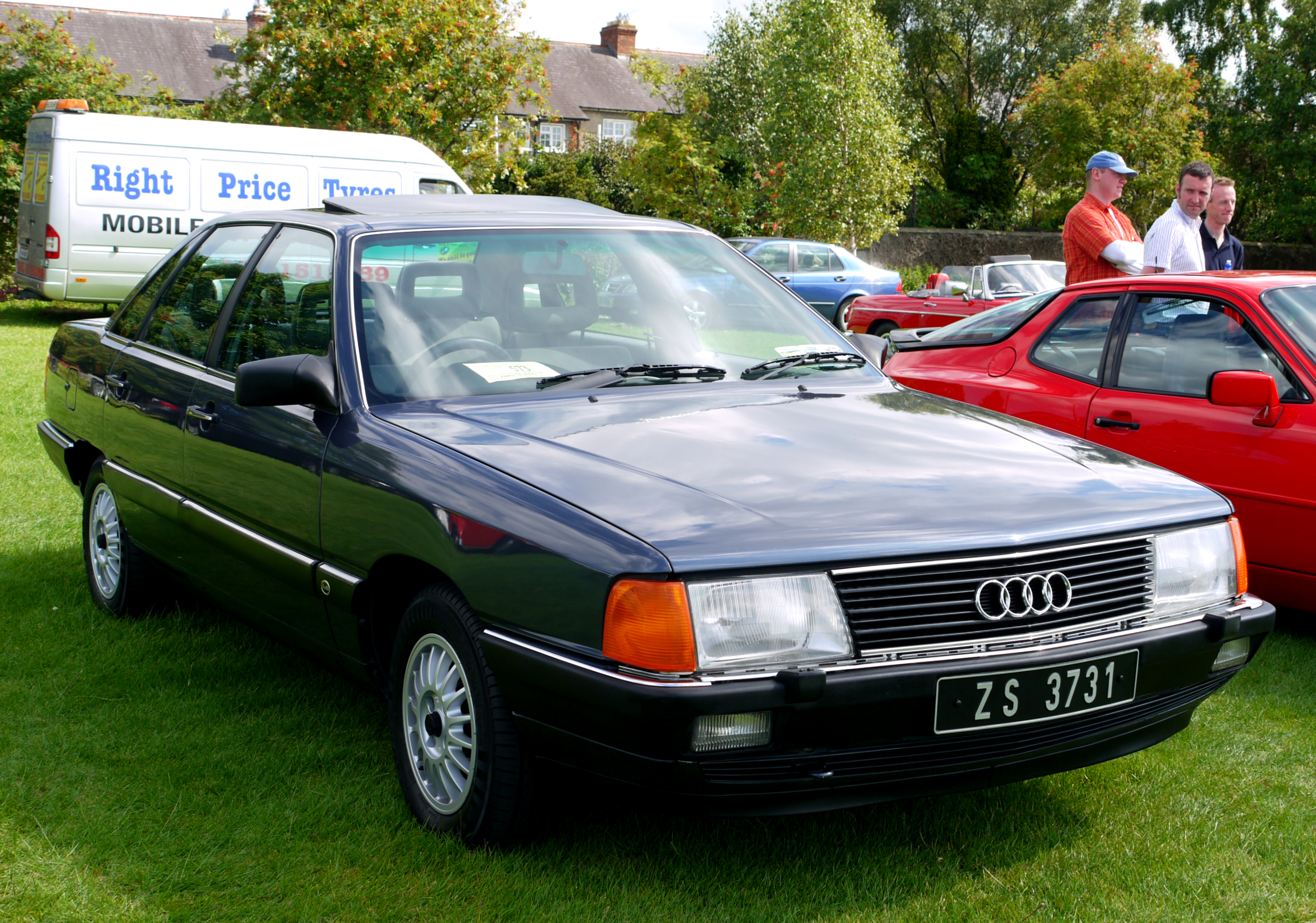 1986 Audi 100 2.0E saloon.